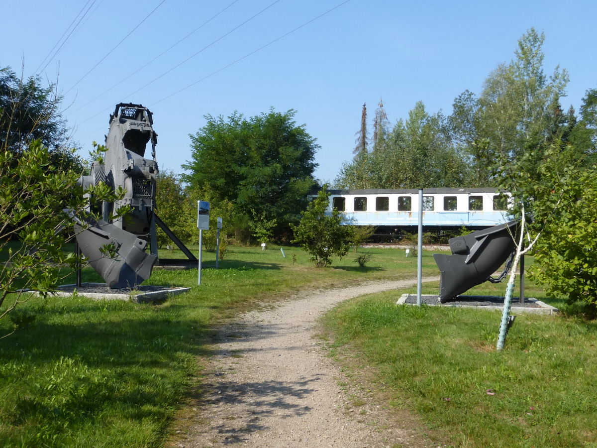 Diverse Exponate aus dem Braunkohlebergbau, ausgestellt im so genannten Tertiärwald in Wackersdorf (Oberpfalz)